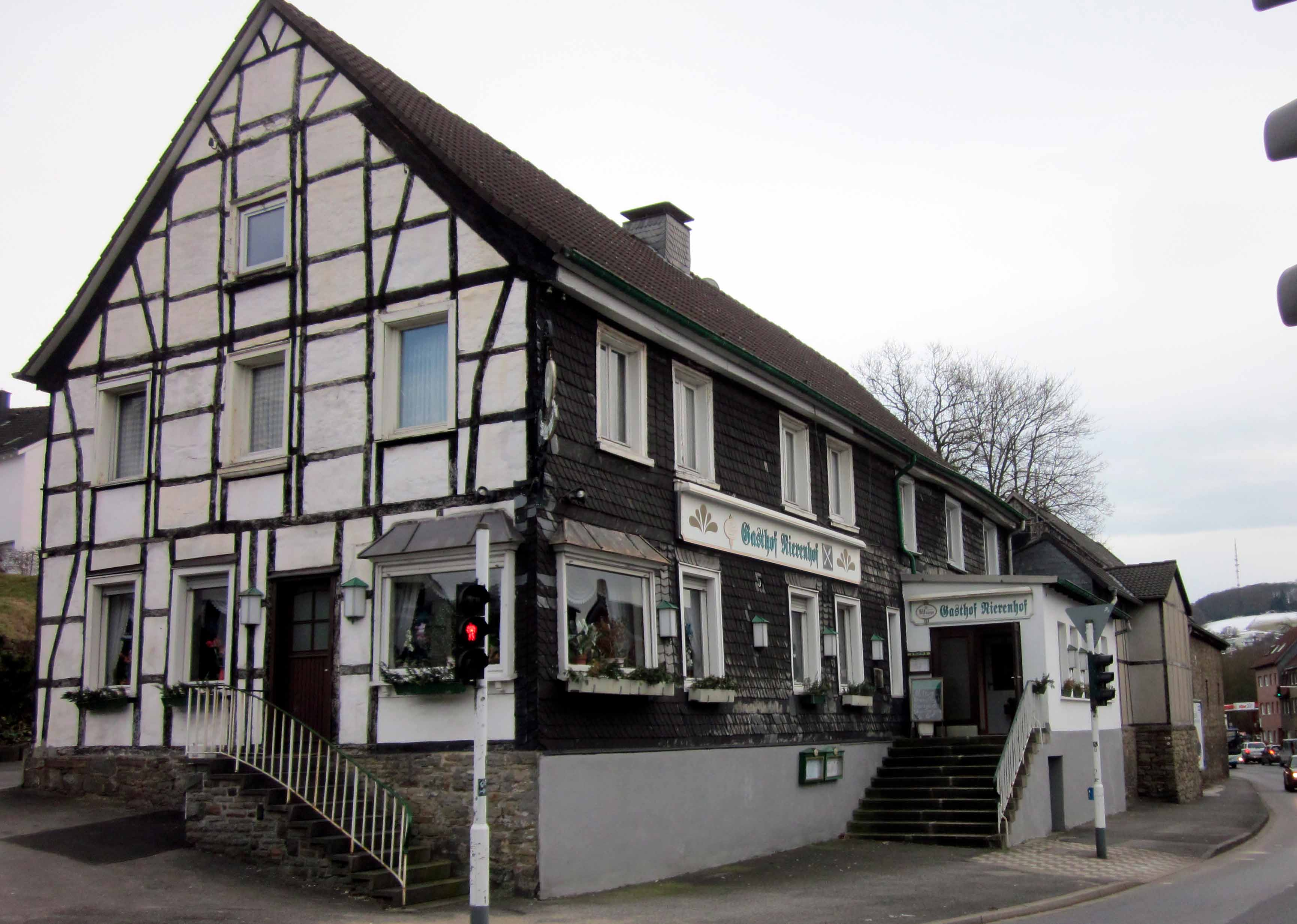 Gasthof Nierenhof (Westseite) 2013